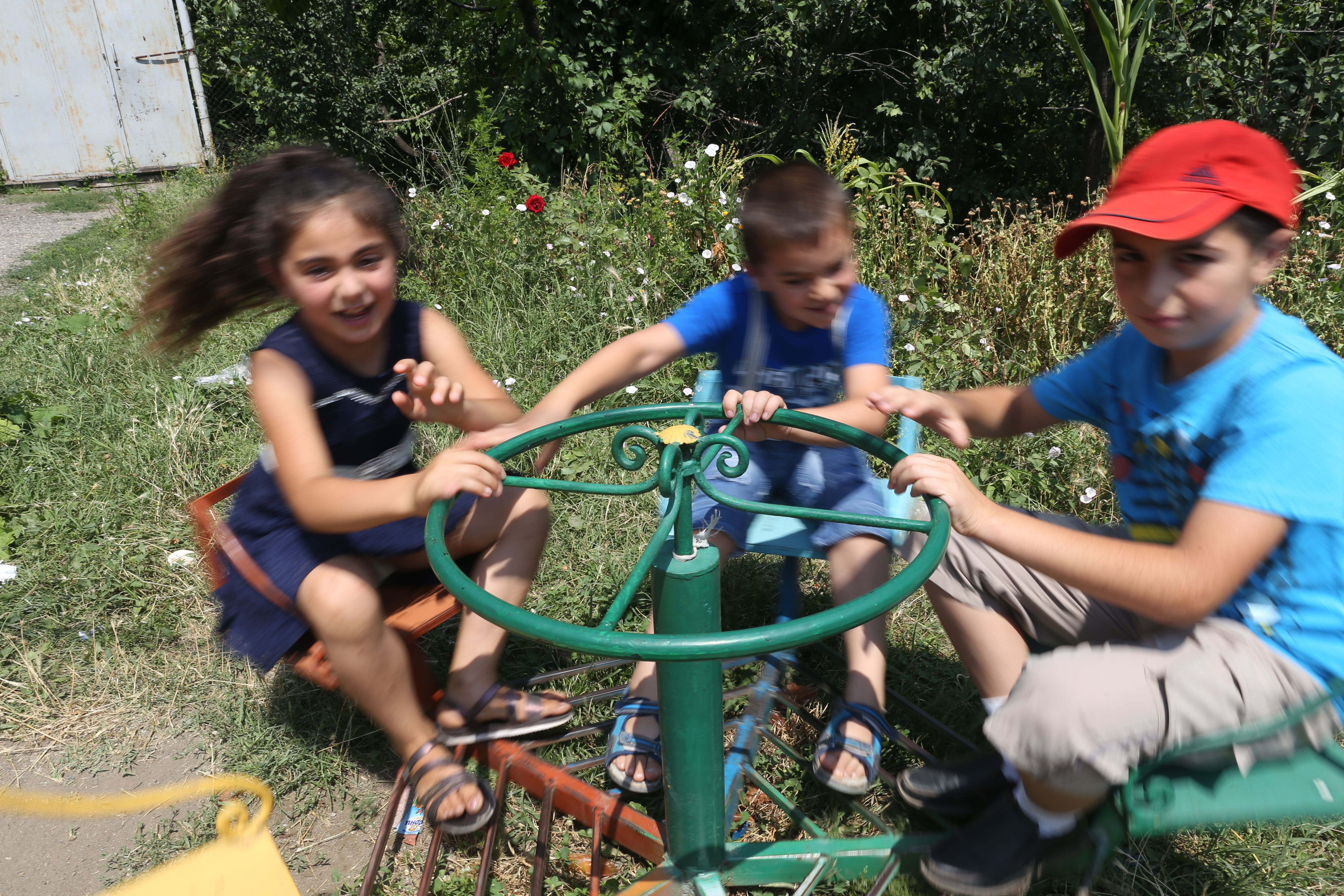 Հայաստանի գյուղերի երեխաները խաղում են նոորաստեղծ խաղահրապարակում